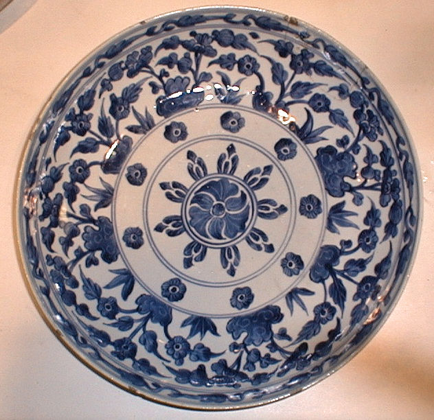 Schotel Kraakporselein vroeg 18de eeuw.